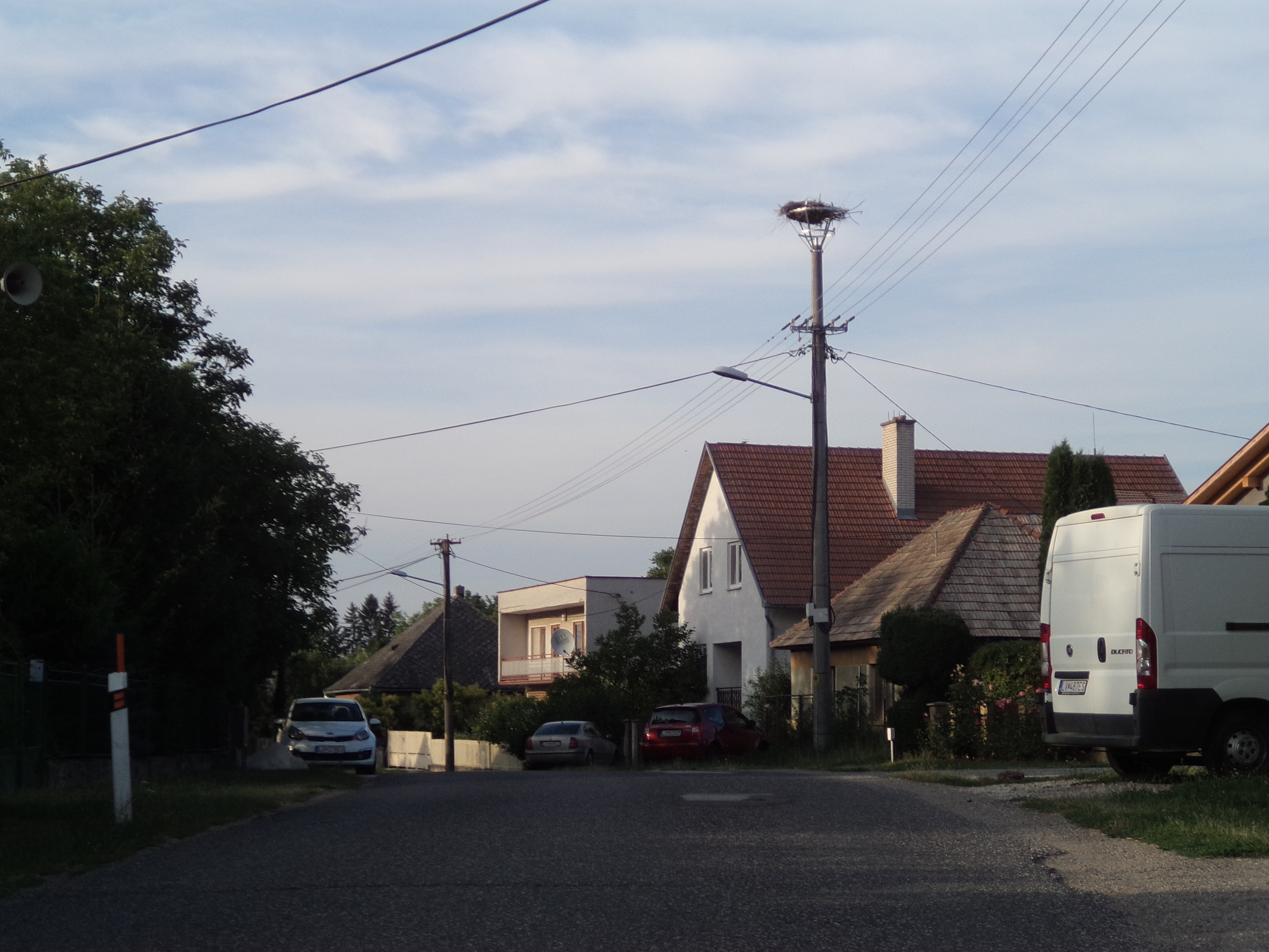 Kistompa 1. gólyafészek 2016